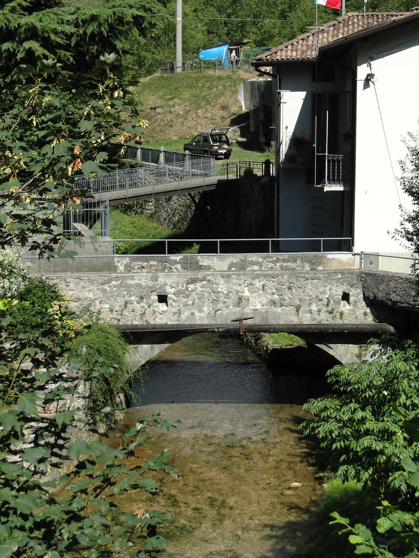 Ponte sul torrente Doppia in loc. Molini. Cene (BG), Italia